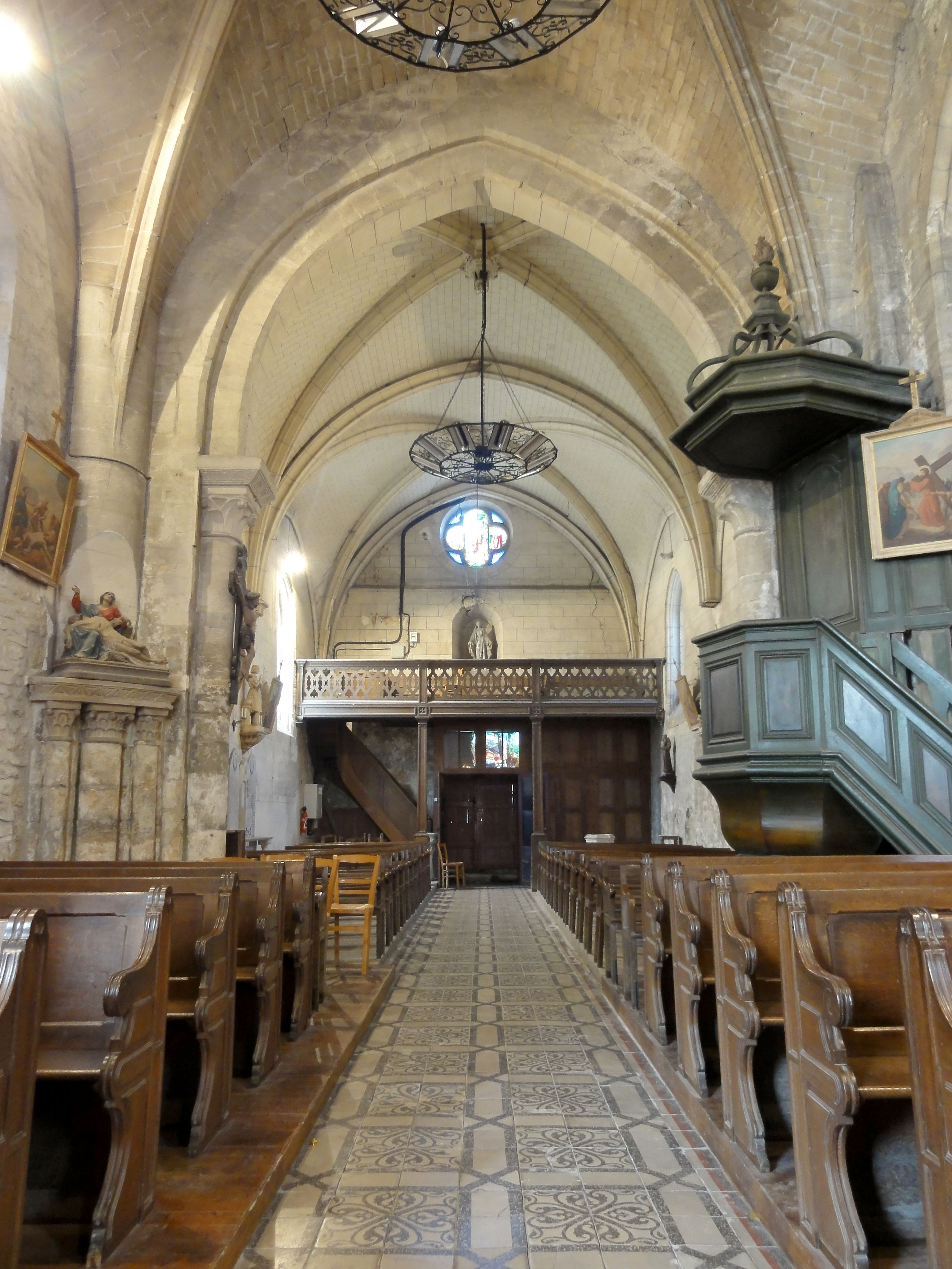 Nef, travée supplémentaire, vue vers l'ouest.